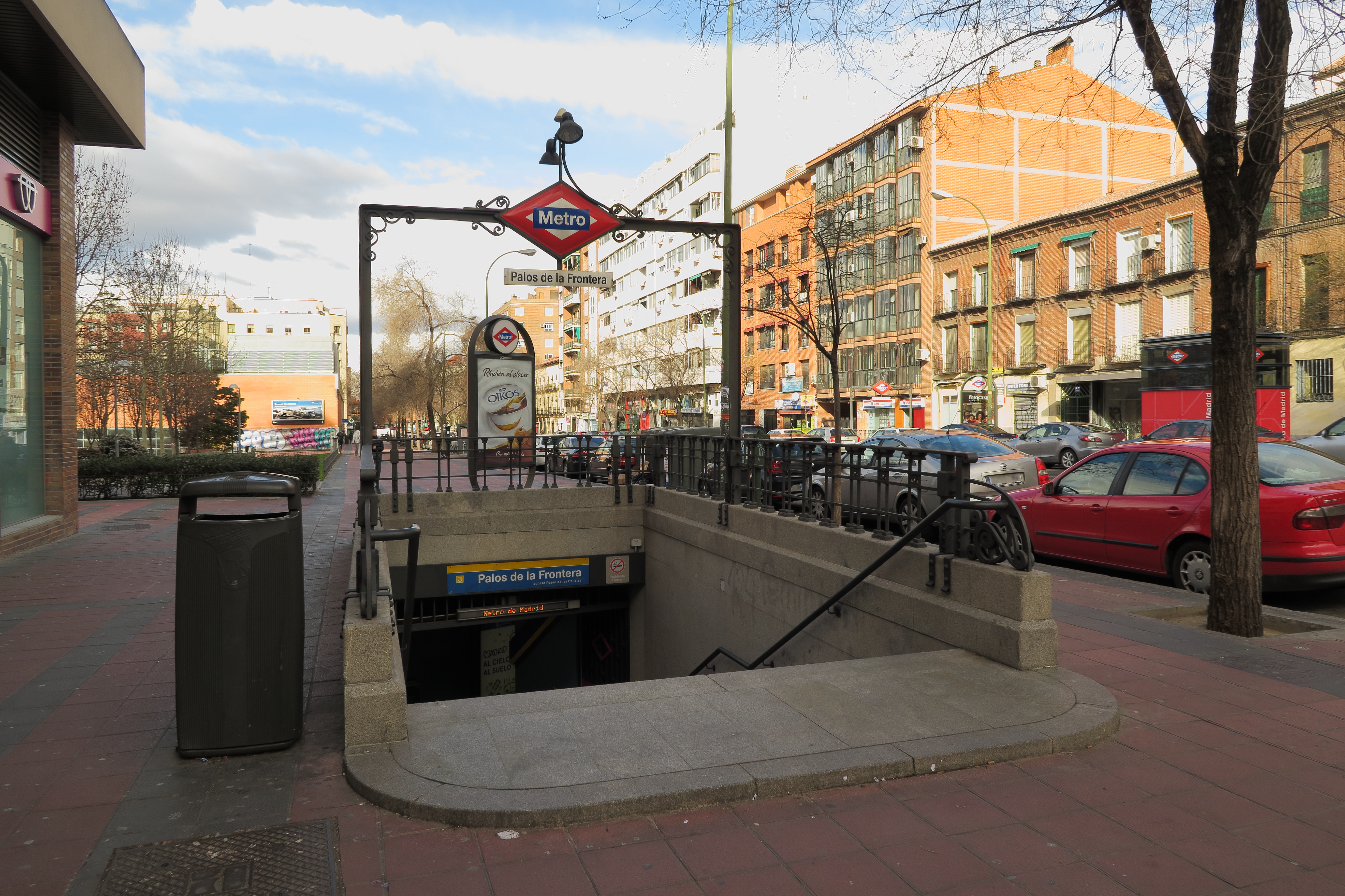 Estación de Palos de la Frontera